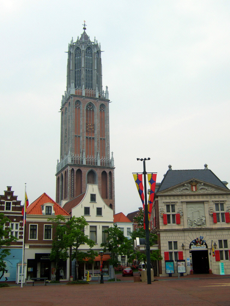 ドムトールン遠望（ハウステンボス） Domtoren in Huis Ten Bosch(Theme Park)